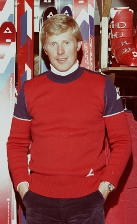 Erik Håker og Odd Sørli.